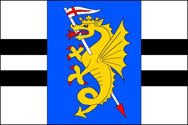 Vlajka obce Bořitov